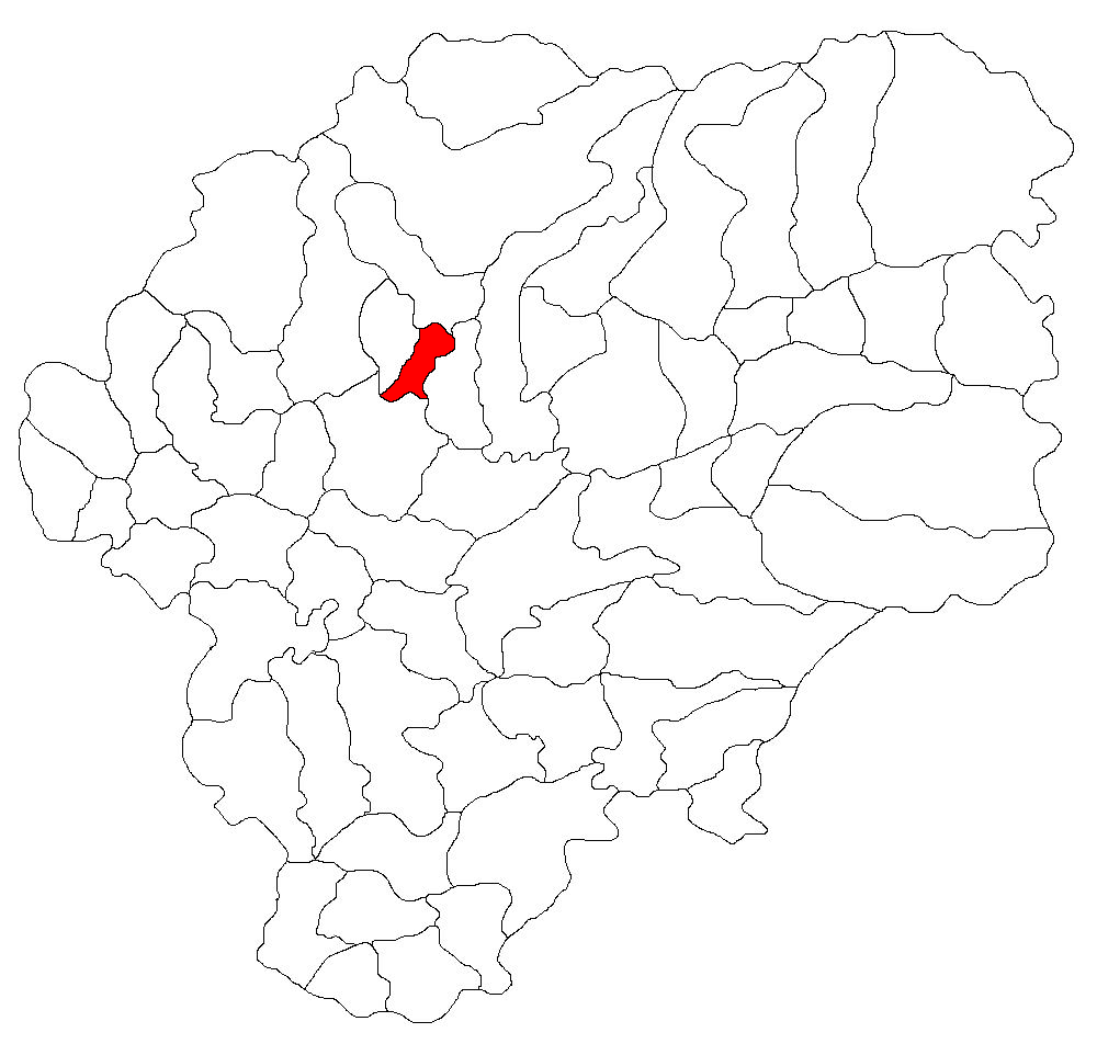 Categorie:Hărţi ale judeţului Bistriţa-Năsăud